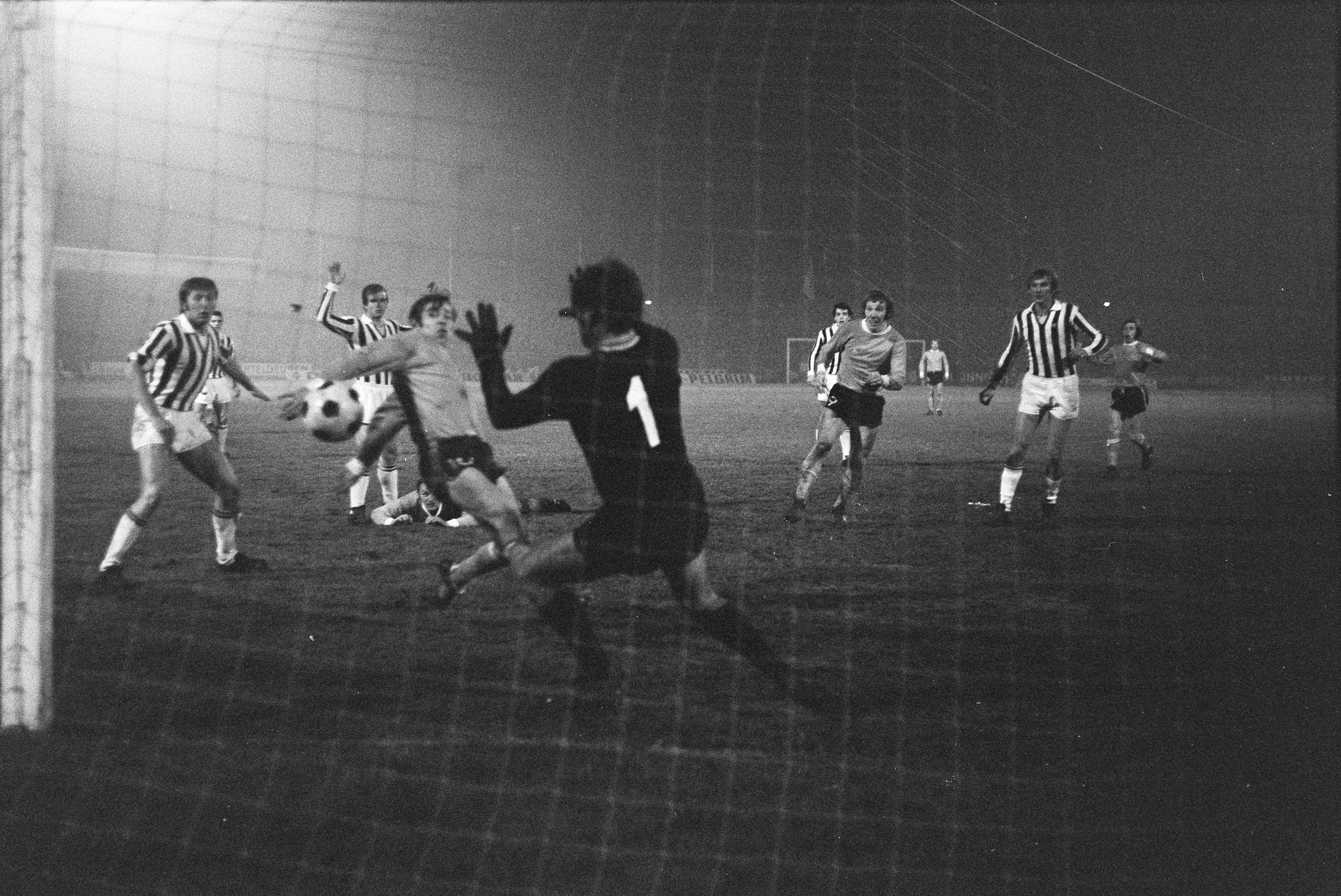 Enschede (Nederland). Kwartfinale van Jaarbeursstedenbeker 1970-71. FC Twente tegen Juventus FC 2-2; tweede Twente doelpunt.